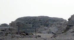 Pyramid Lepsius XXV in Abousir